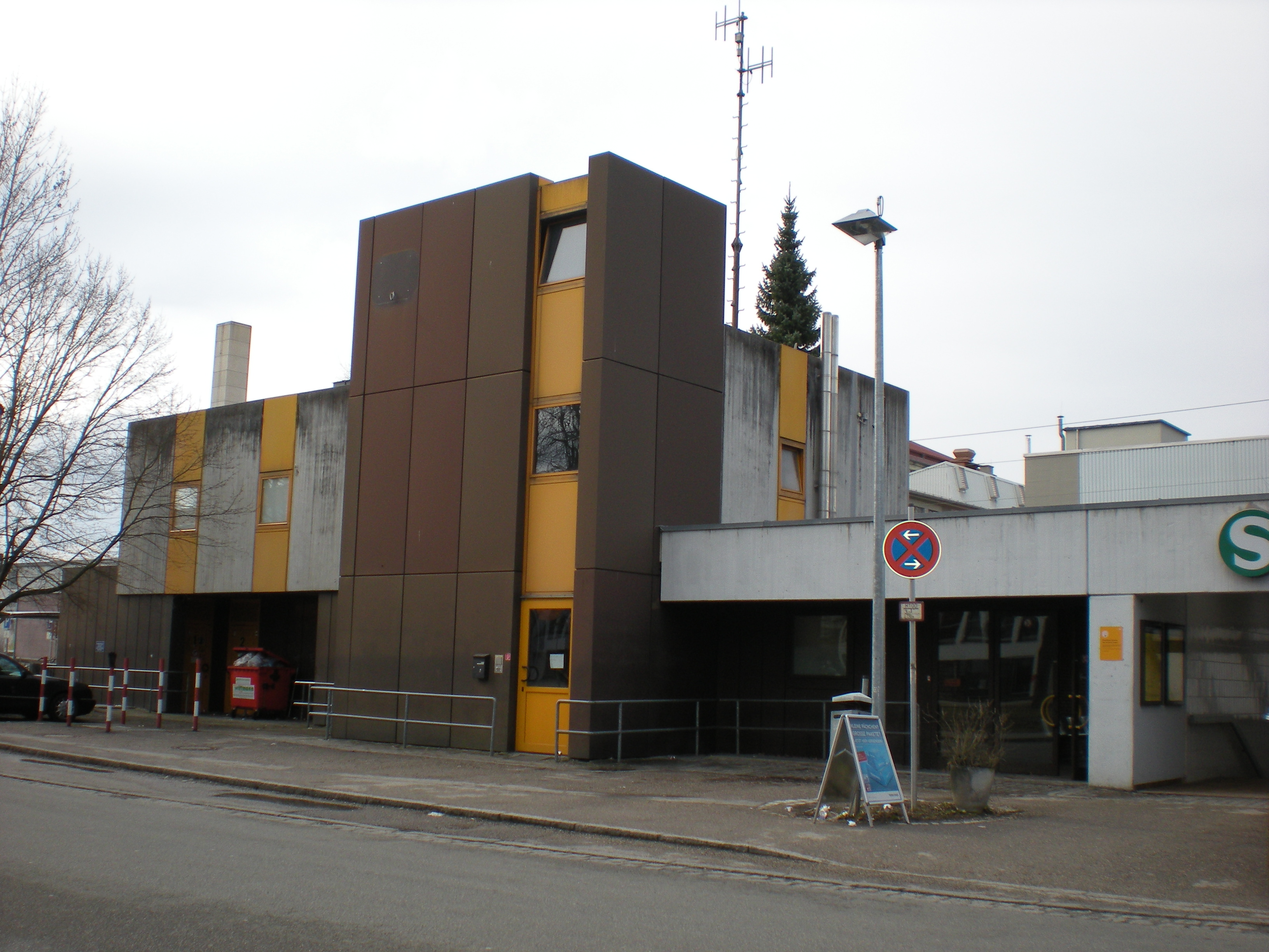 Empfangsgebäude des Münchner S-Bahnhofs Höllriegelskreuth von 1978 im Jahr 2013